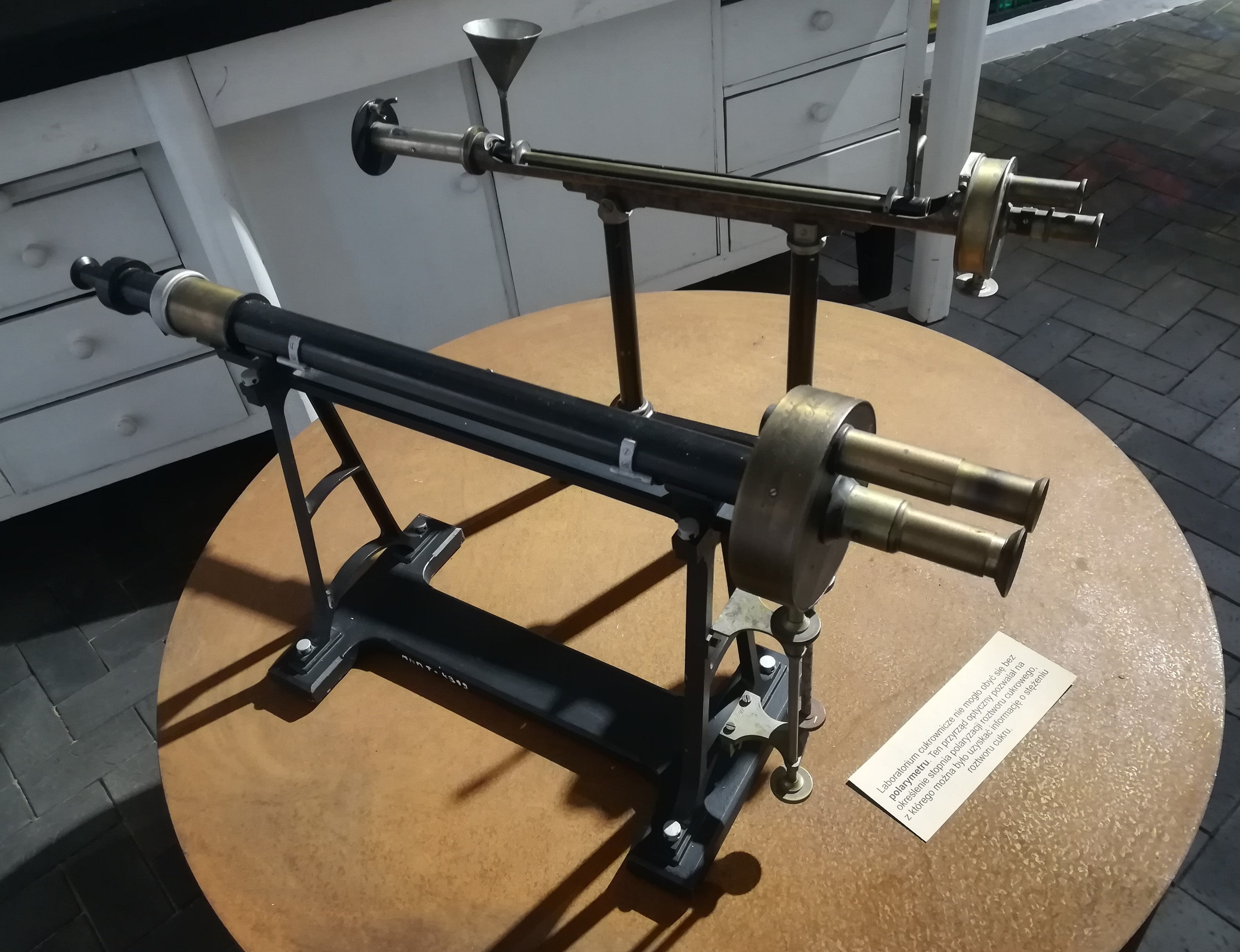 Polarymetr cukrowniczy w Muzeum Rolnictwa w Szreniawie.